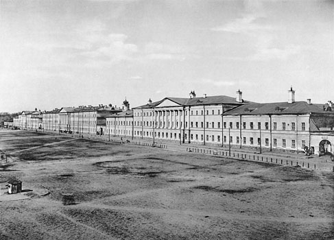 190. Хамовническiя казармы. (Москва)